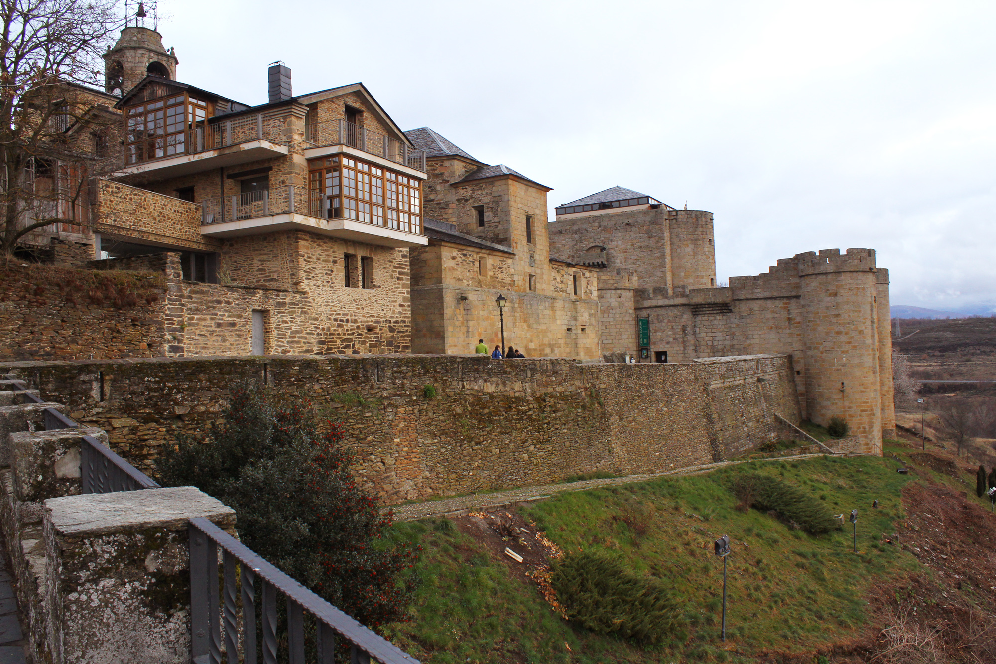 Castle of Puebla de Sanabria